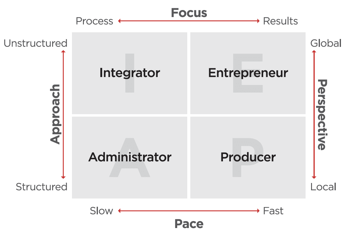 PAEI roles of management by Adizes